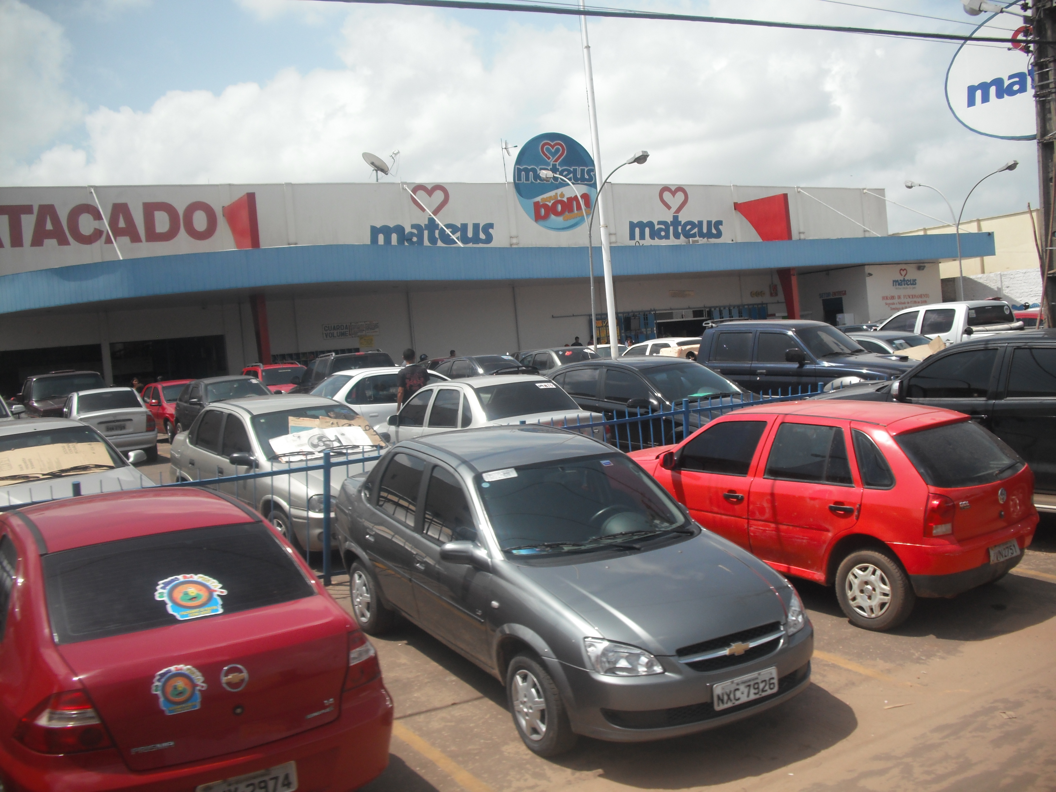 Mateus Supermercados, filial Sta inês